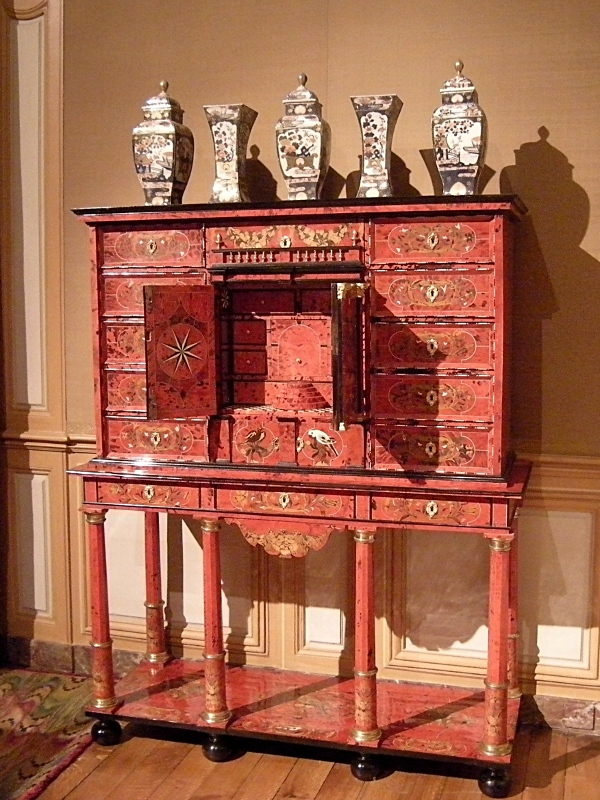 Cabinet d'écaille rouge attribué à Pierre Golle (XVIIème siècle), château de Vaux-le-Vicomte